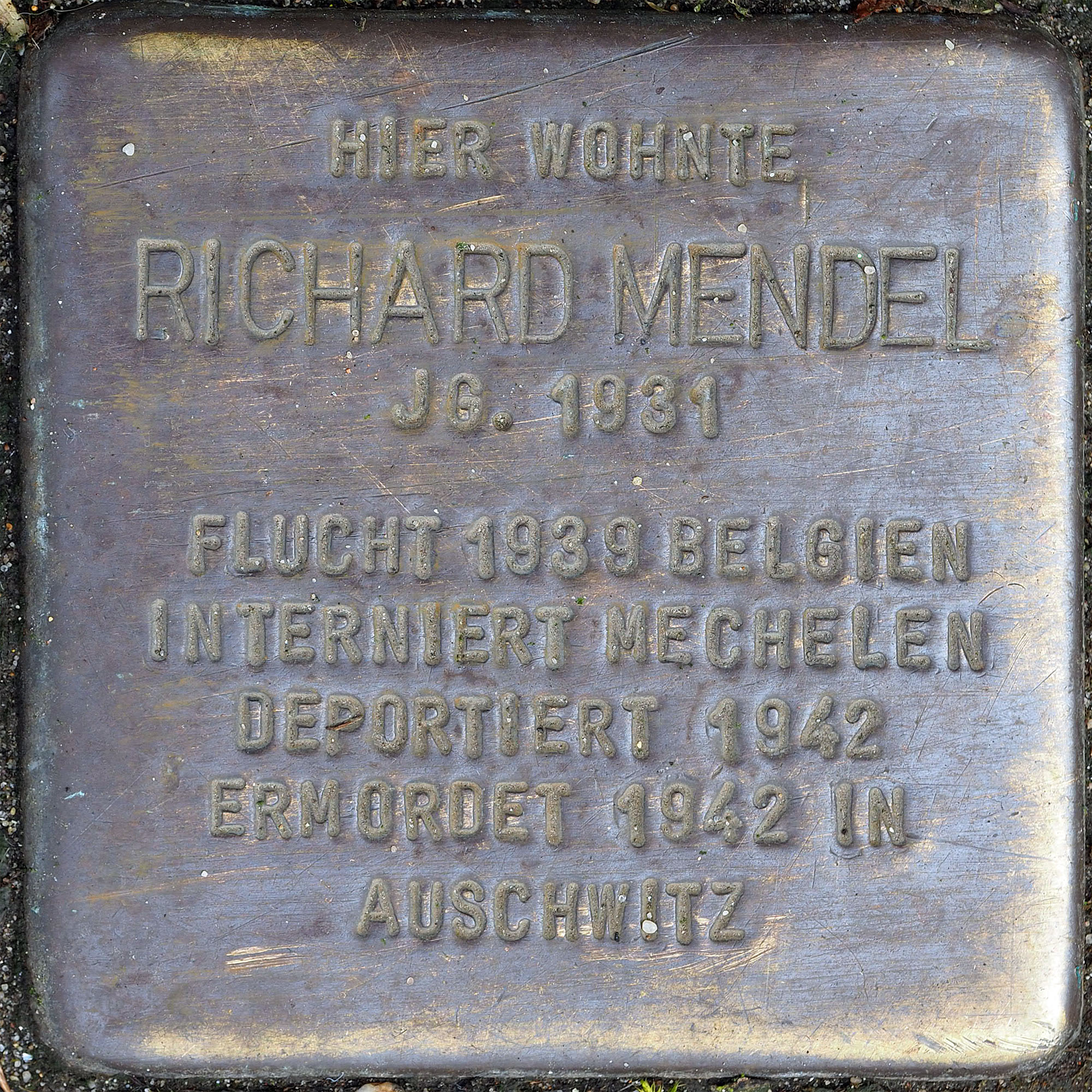 Stolpersteine MG: Mendel, Richard